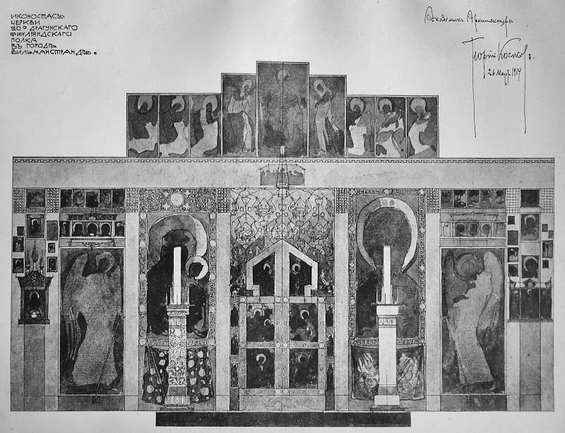 Проект иконостаса церкви Вильямстада работы архитектора Георгия Косякова